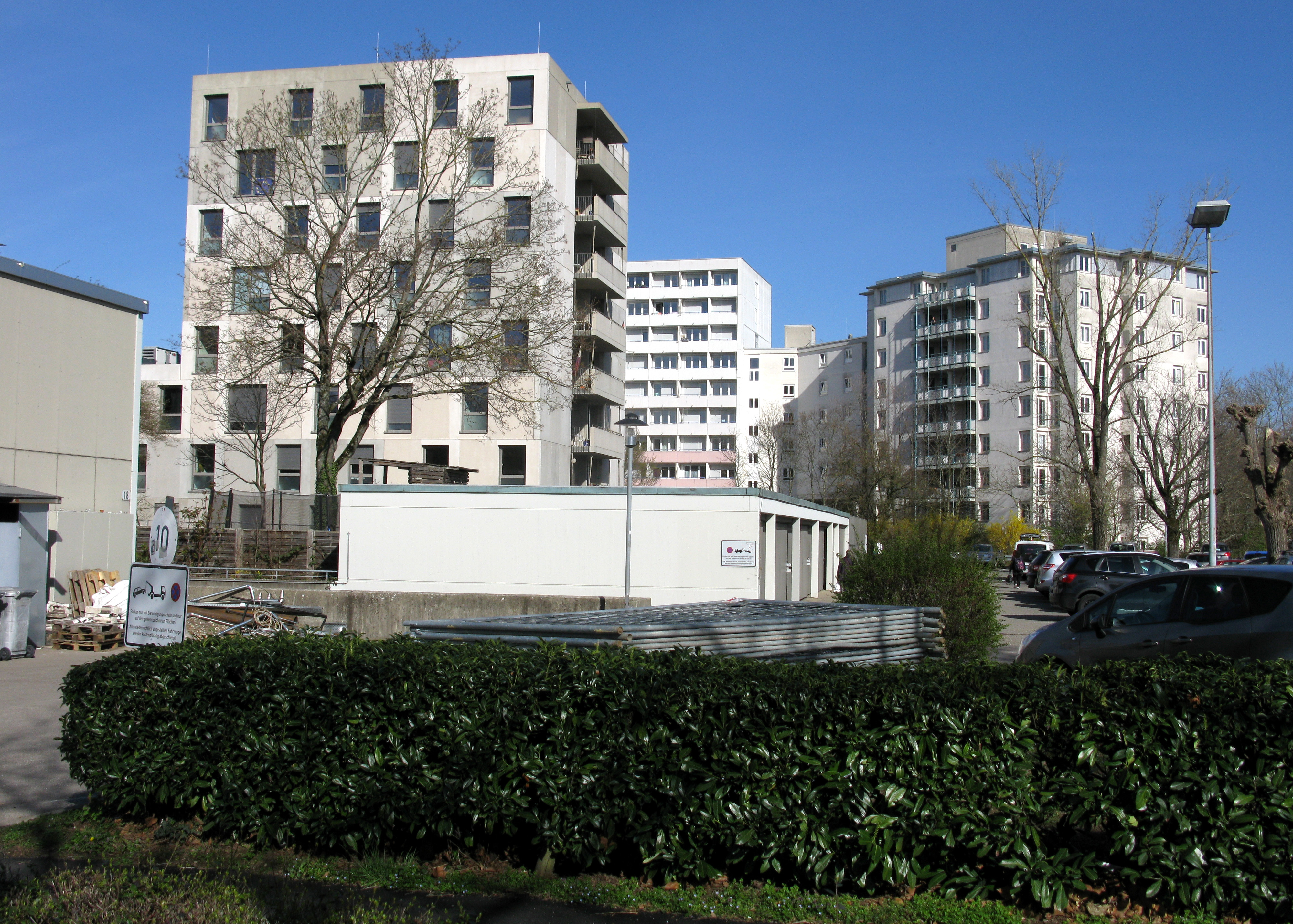 Studentensiedlung mit Neubau am Freiburger Seepark